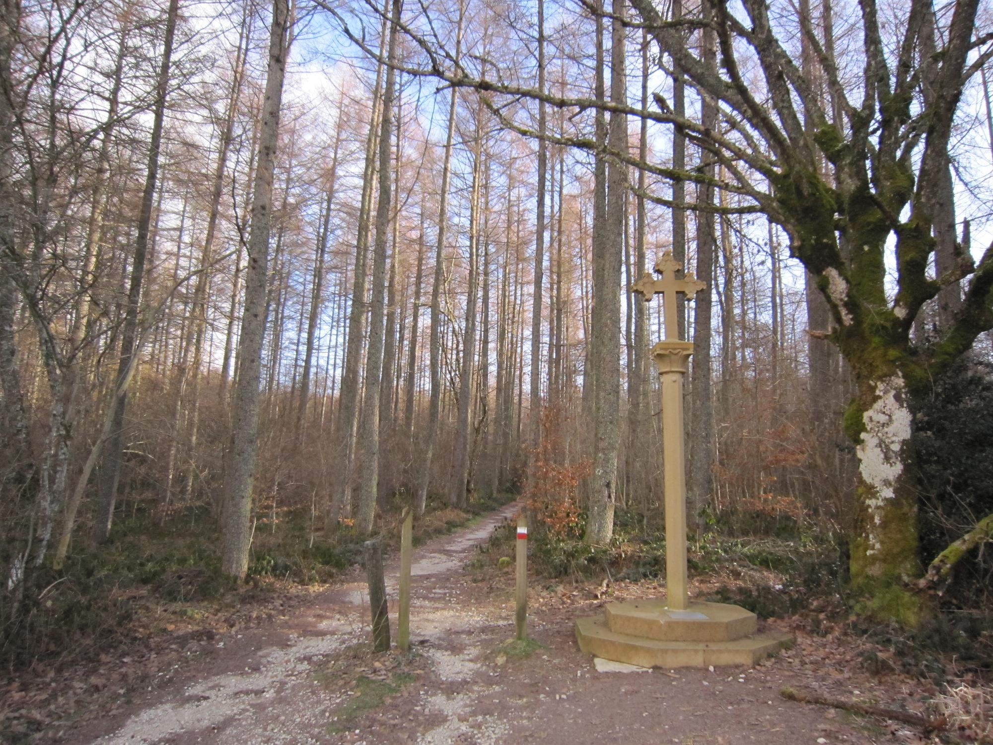 Crucero Blanca, llamada también crucero de Roldán, situda junto a la entrada a Burguete del Camino de Santiago